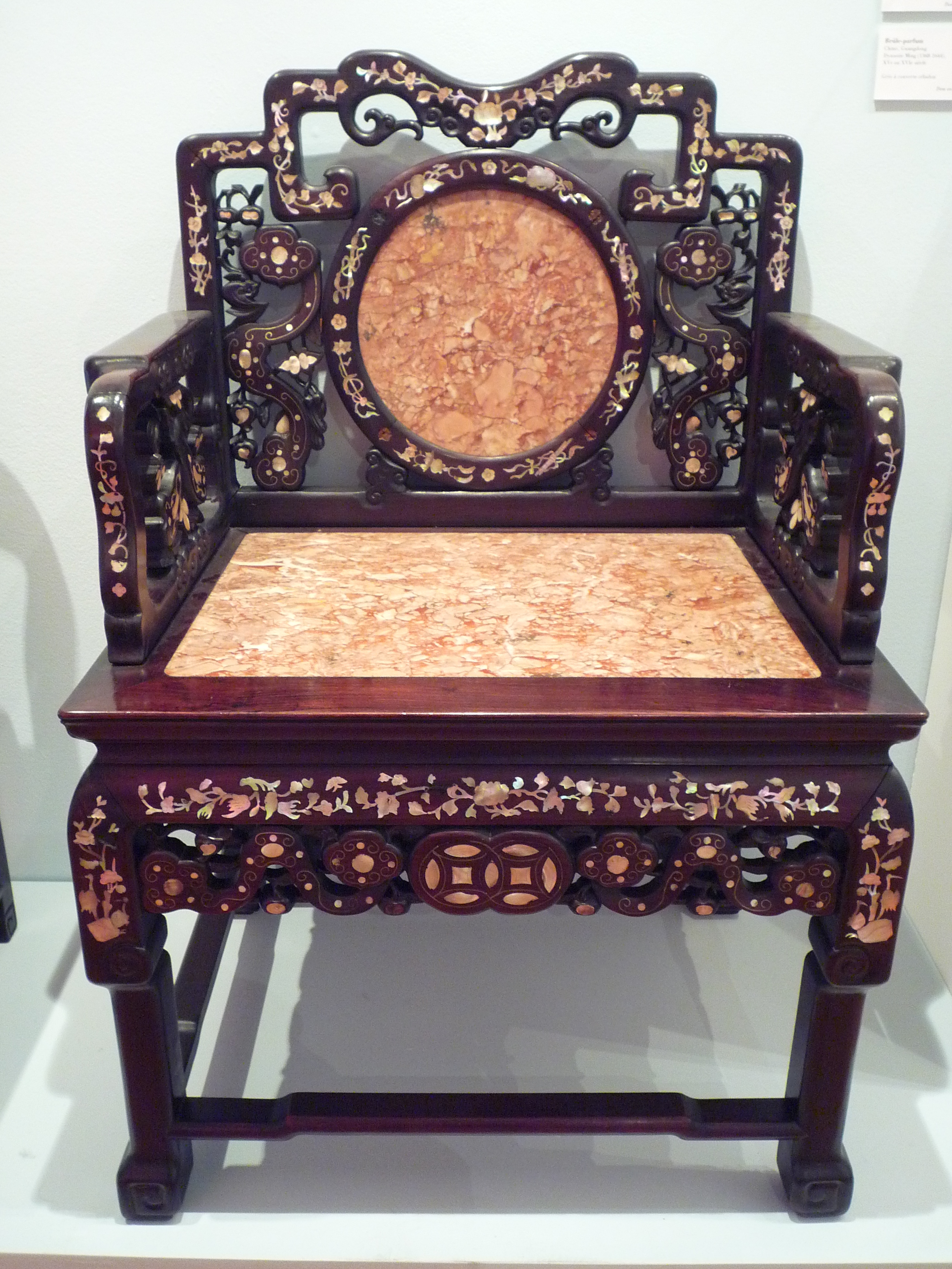 Chaise madarinale du Vietnam (XIXe siècle), bois marbre et nacre. Don du général Léon de Beylié en 1898 au Musée de Grenoble.